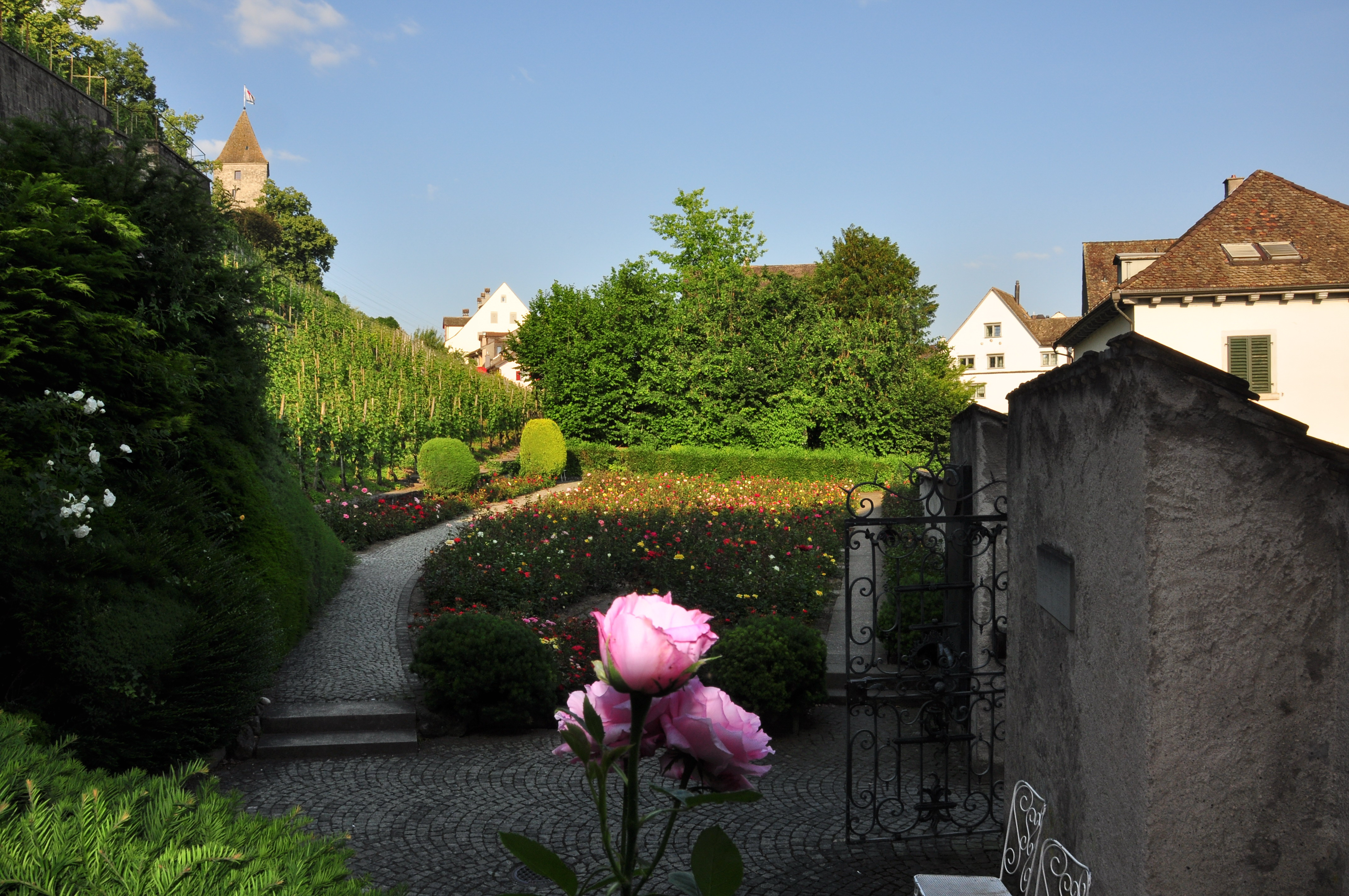 Rose garden in Rapperswil (Switzerland)